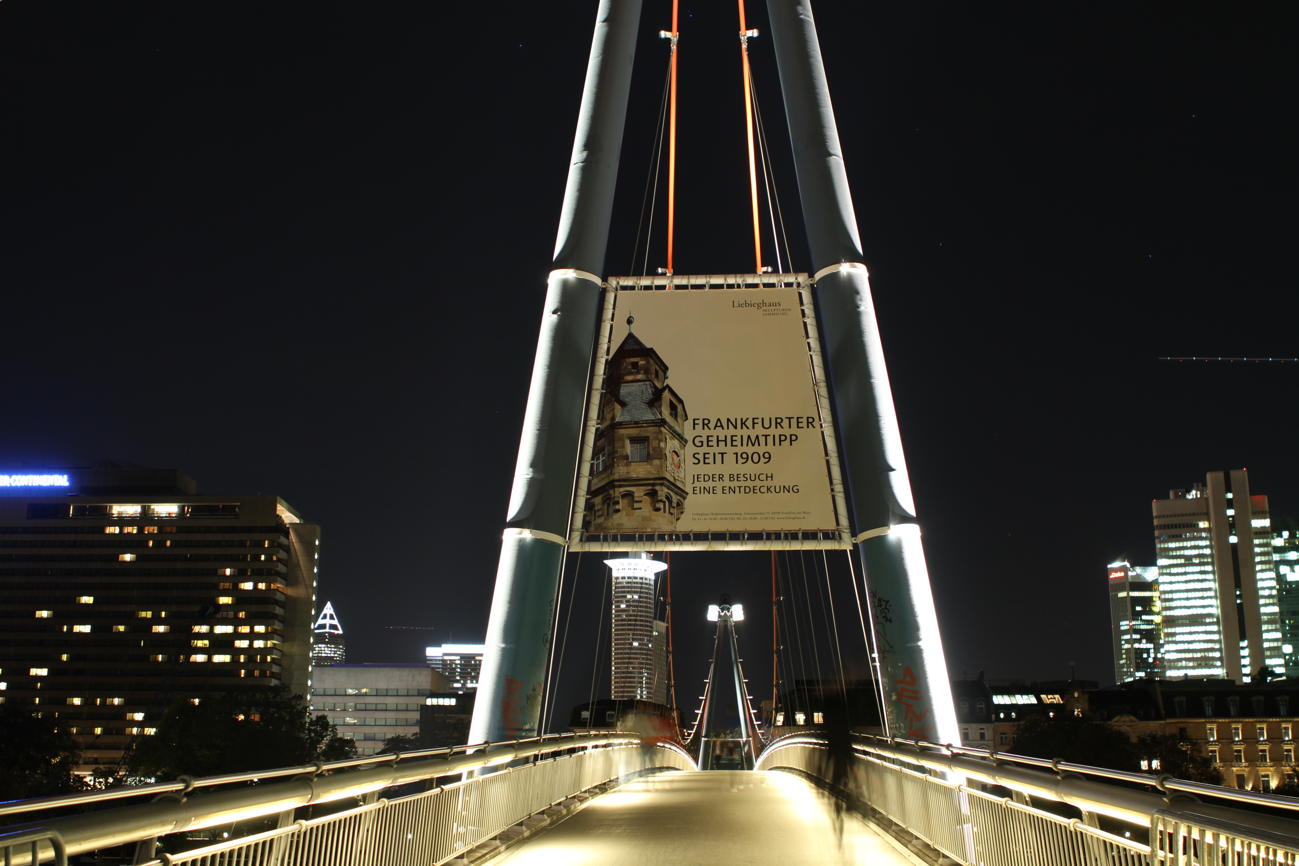 Holbeinsteg Frankfurt am Main bei Nacht